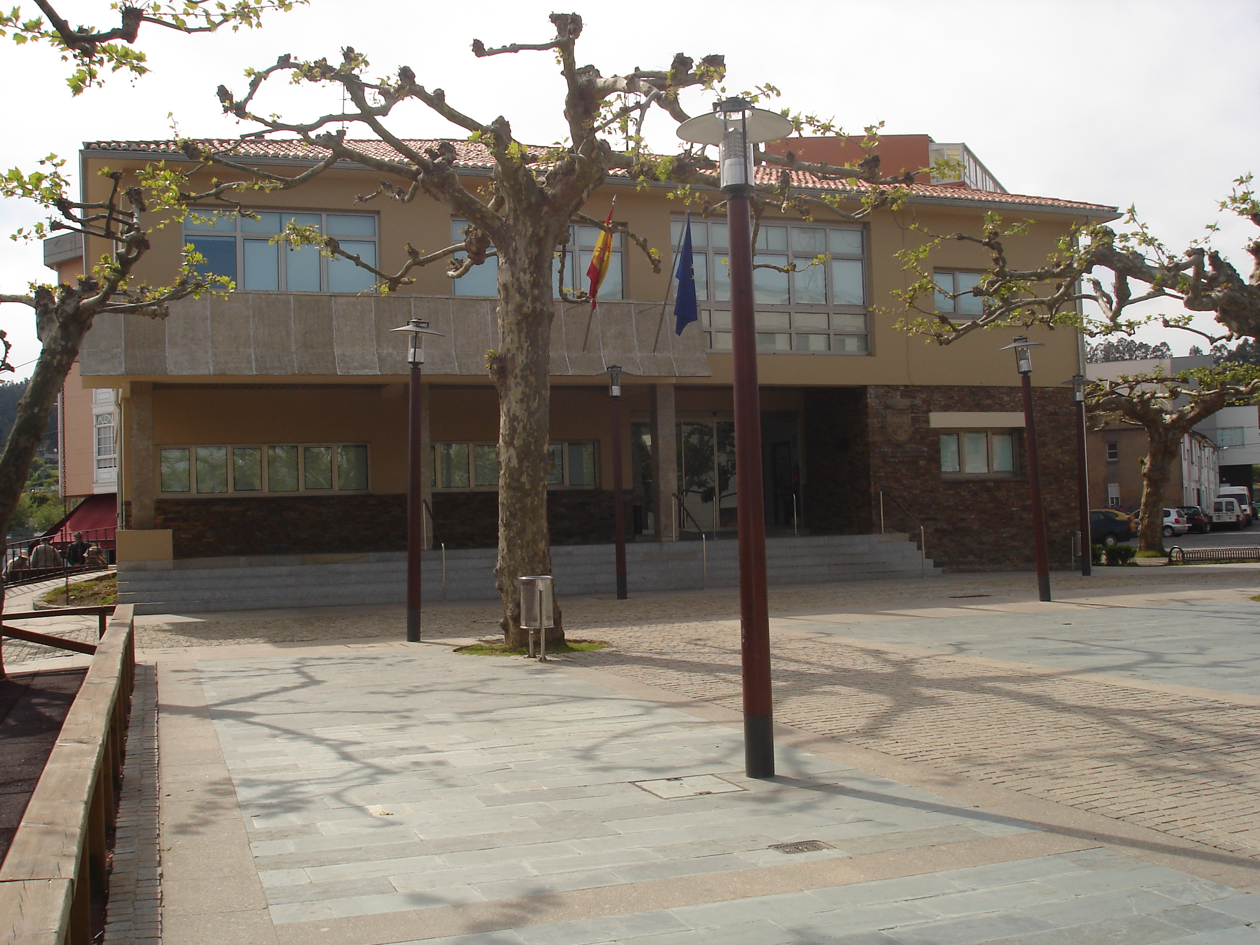 Casa do Concello de Carral Carral Categoría:Imaxes de Carral